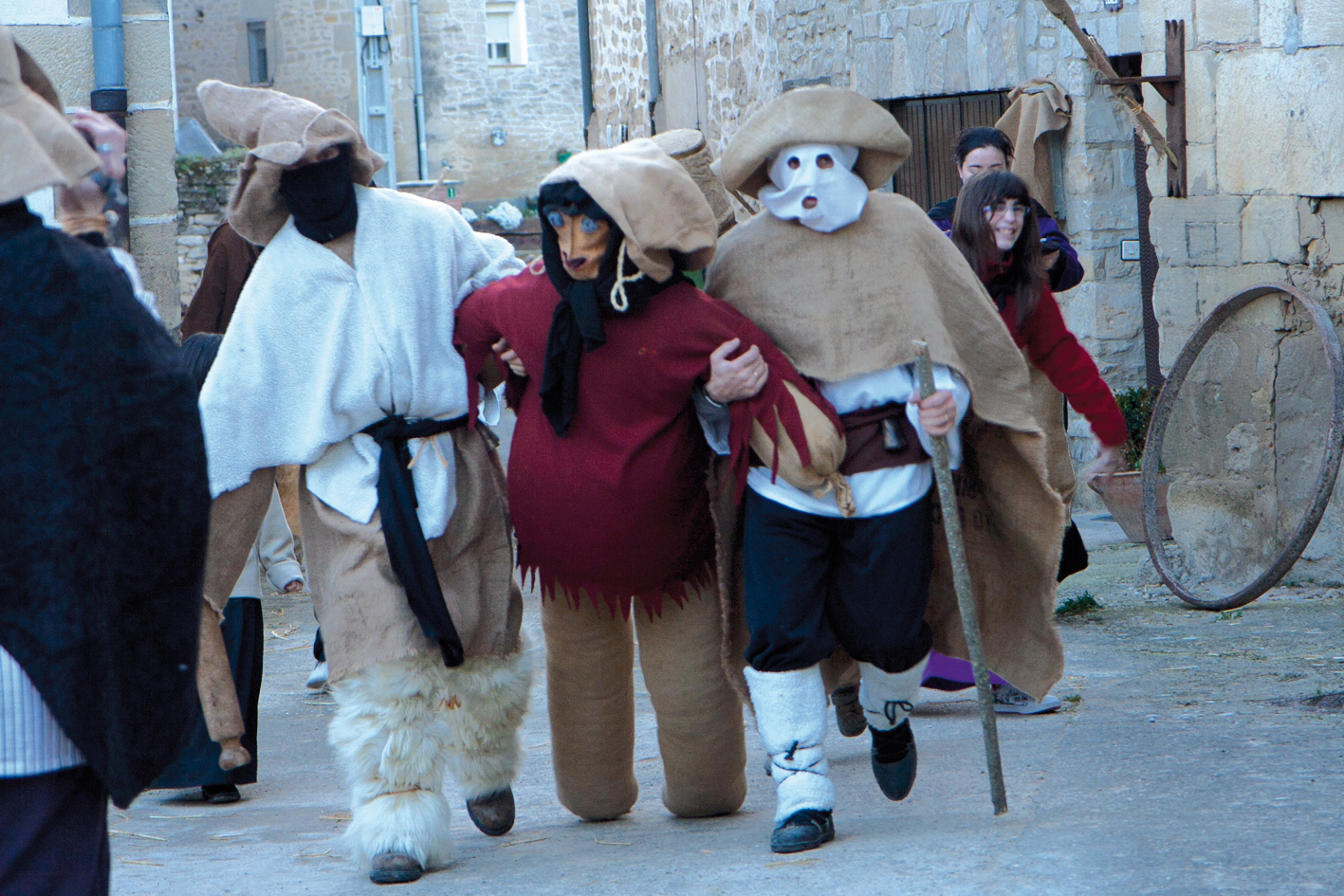 Porretero, Salcedoko inauterietako pertsonaia